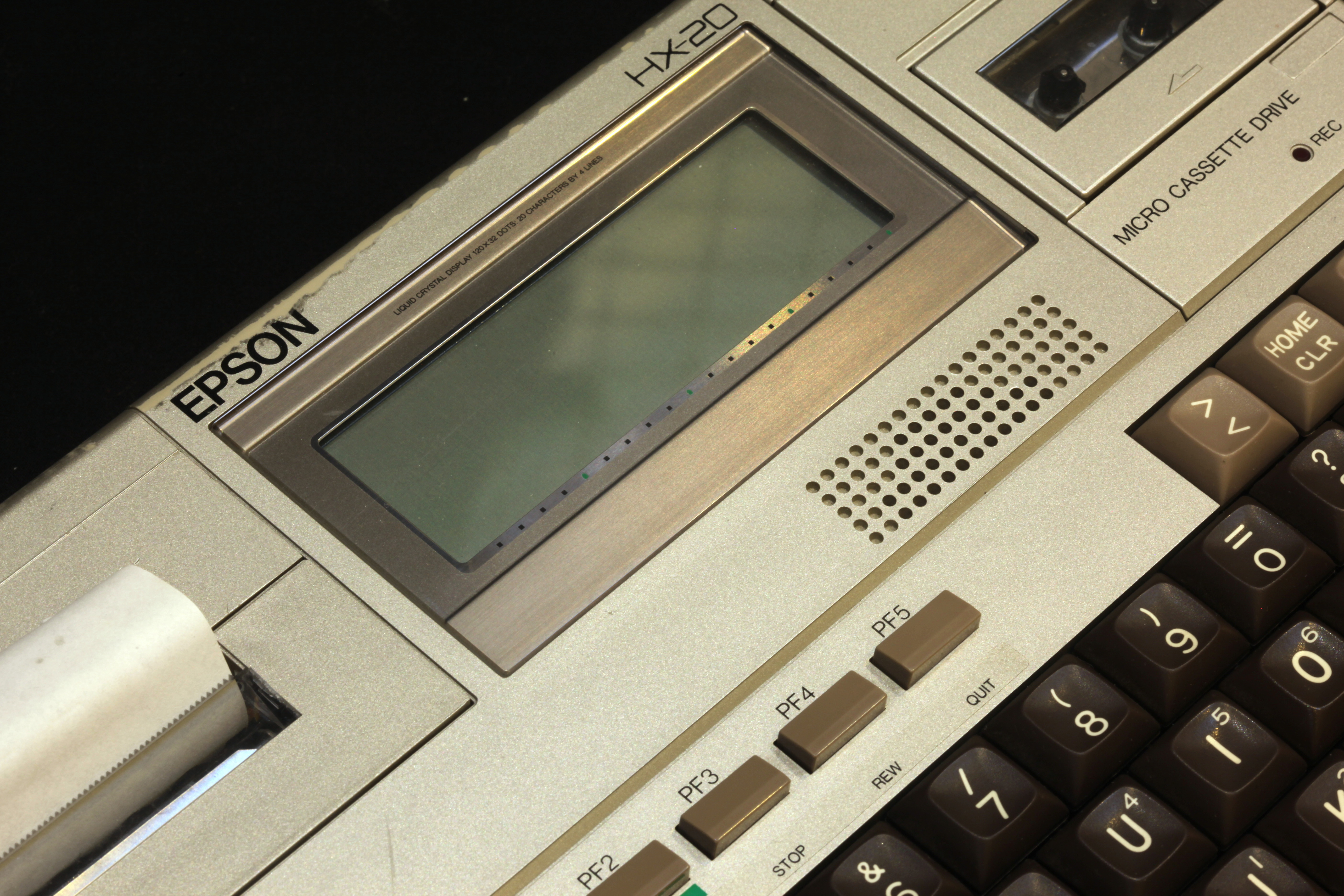 Epson HX-20 computer. On display at the Musée Bolo, EPFL, Lausanne.